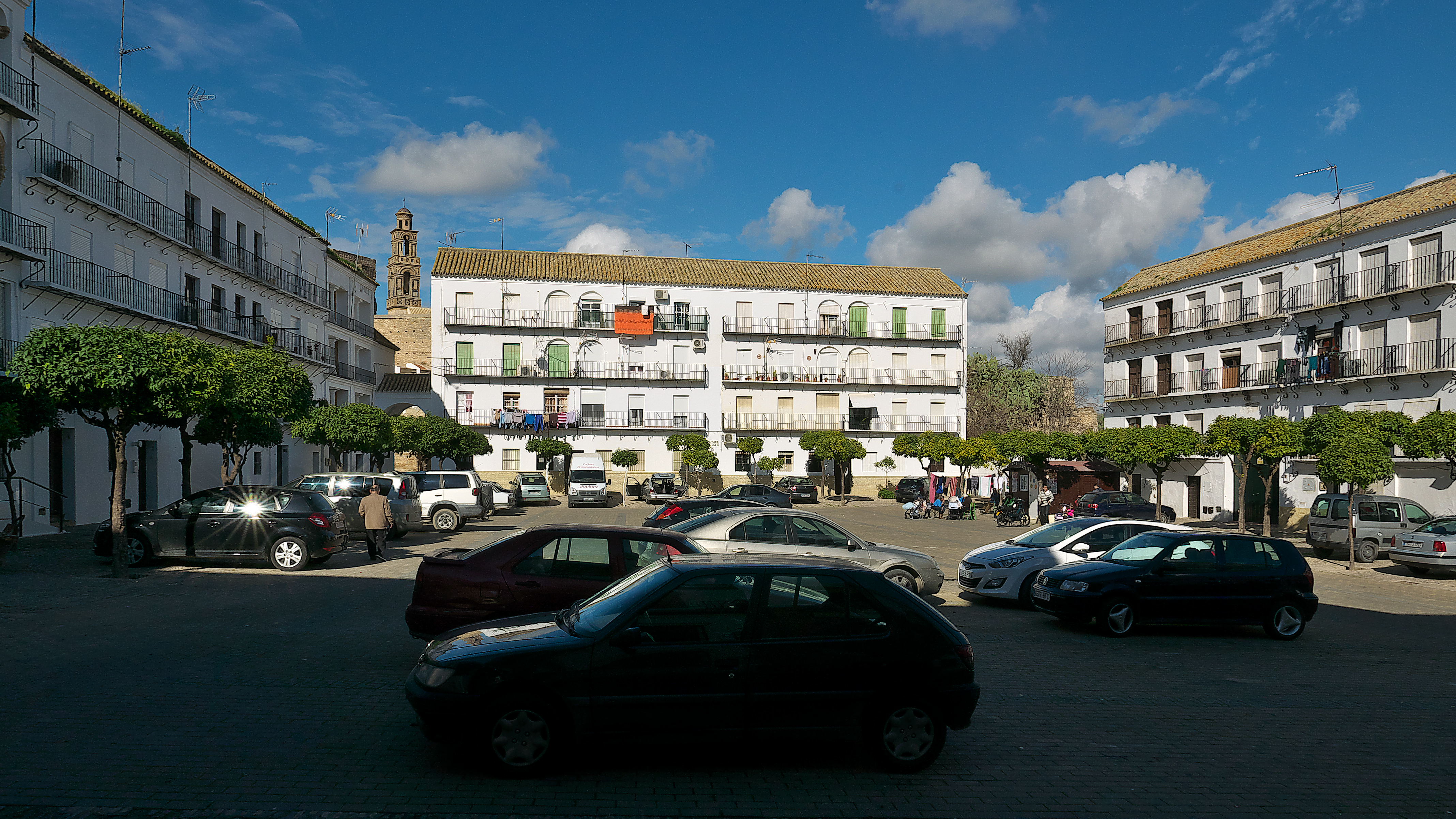 Joaquín Ponce de León, VII Duque de Arcos, reedifica la plaza mayor de Marchena (1711) con la dirección técnica de Alonso Moreno.